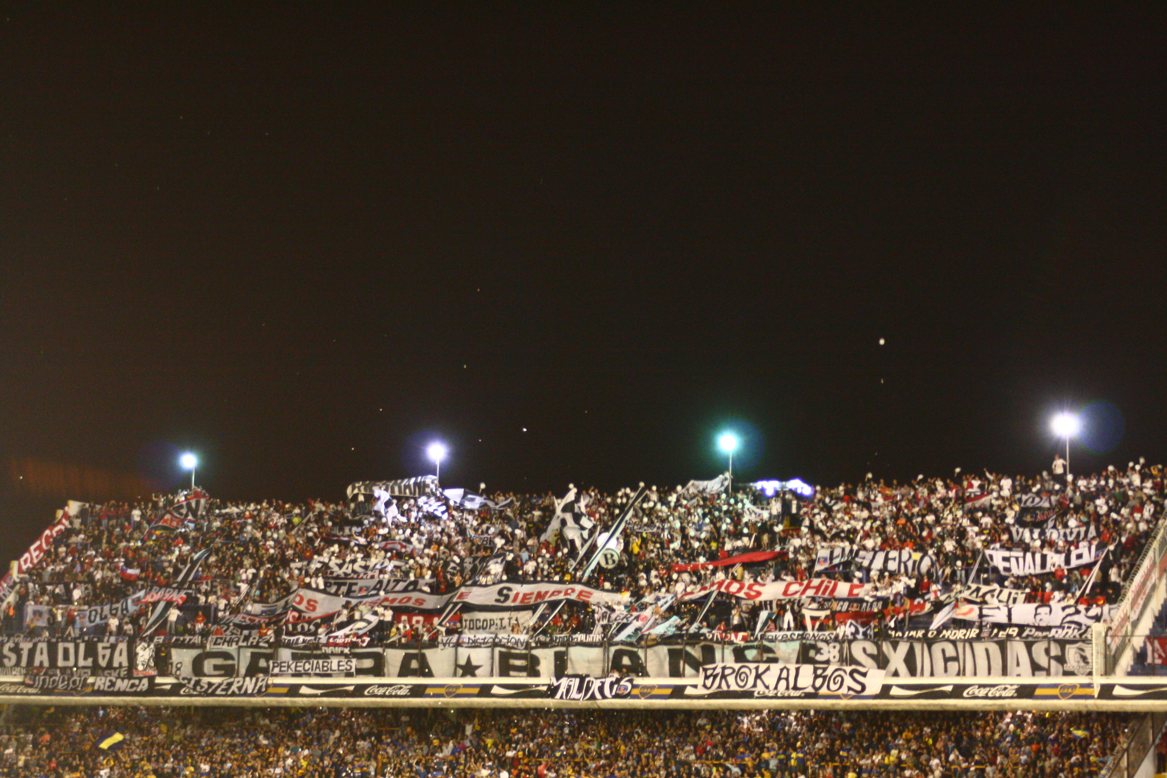 Hinchada de Colo-Colo, Garra Blanca, en el Estadio Alberto J. Armando, Buenos Aires, Argentina.